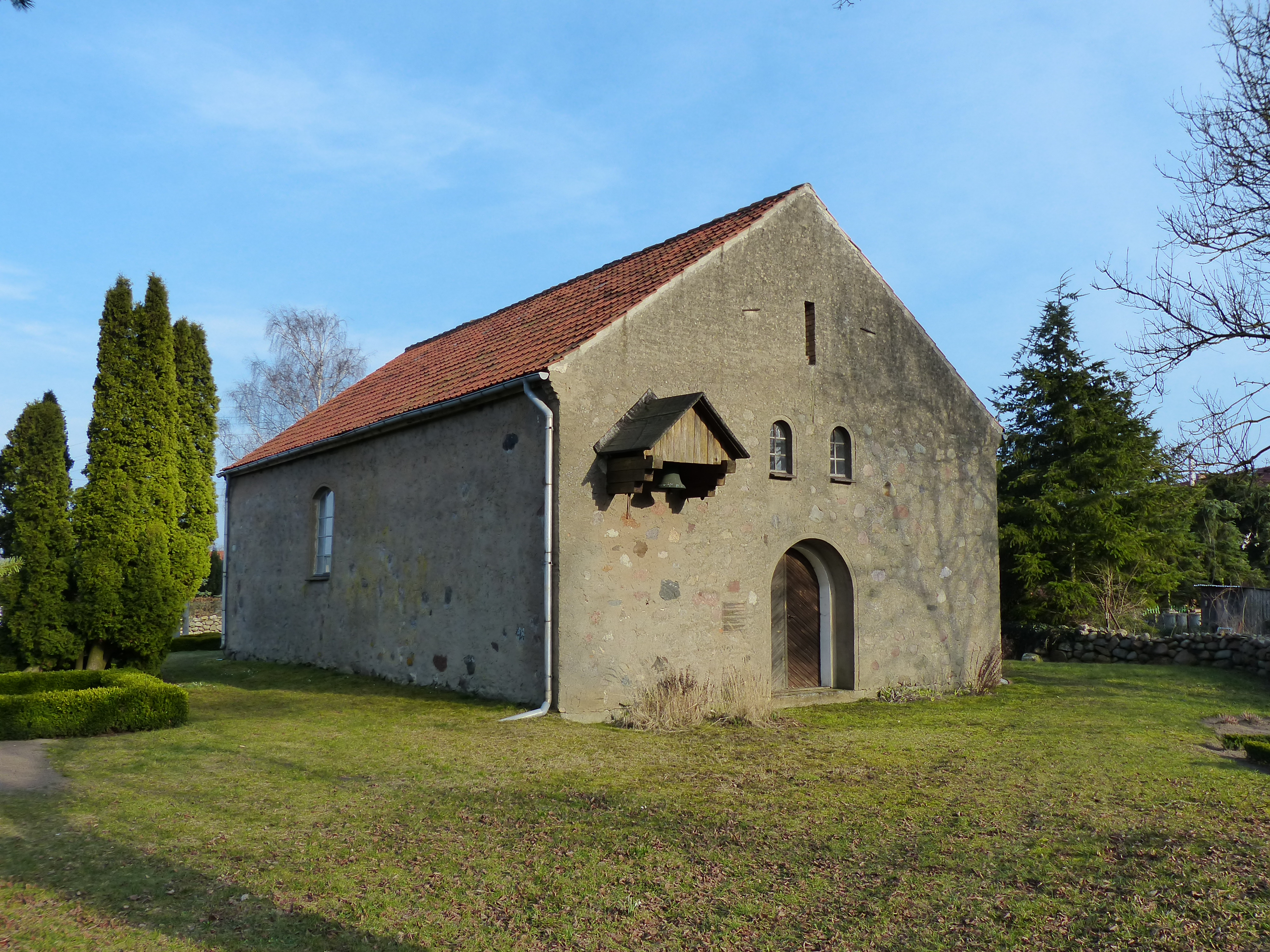 Kapelle Dargibell, Ansicht von Nordwesten